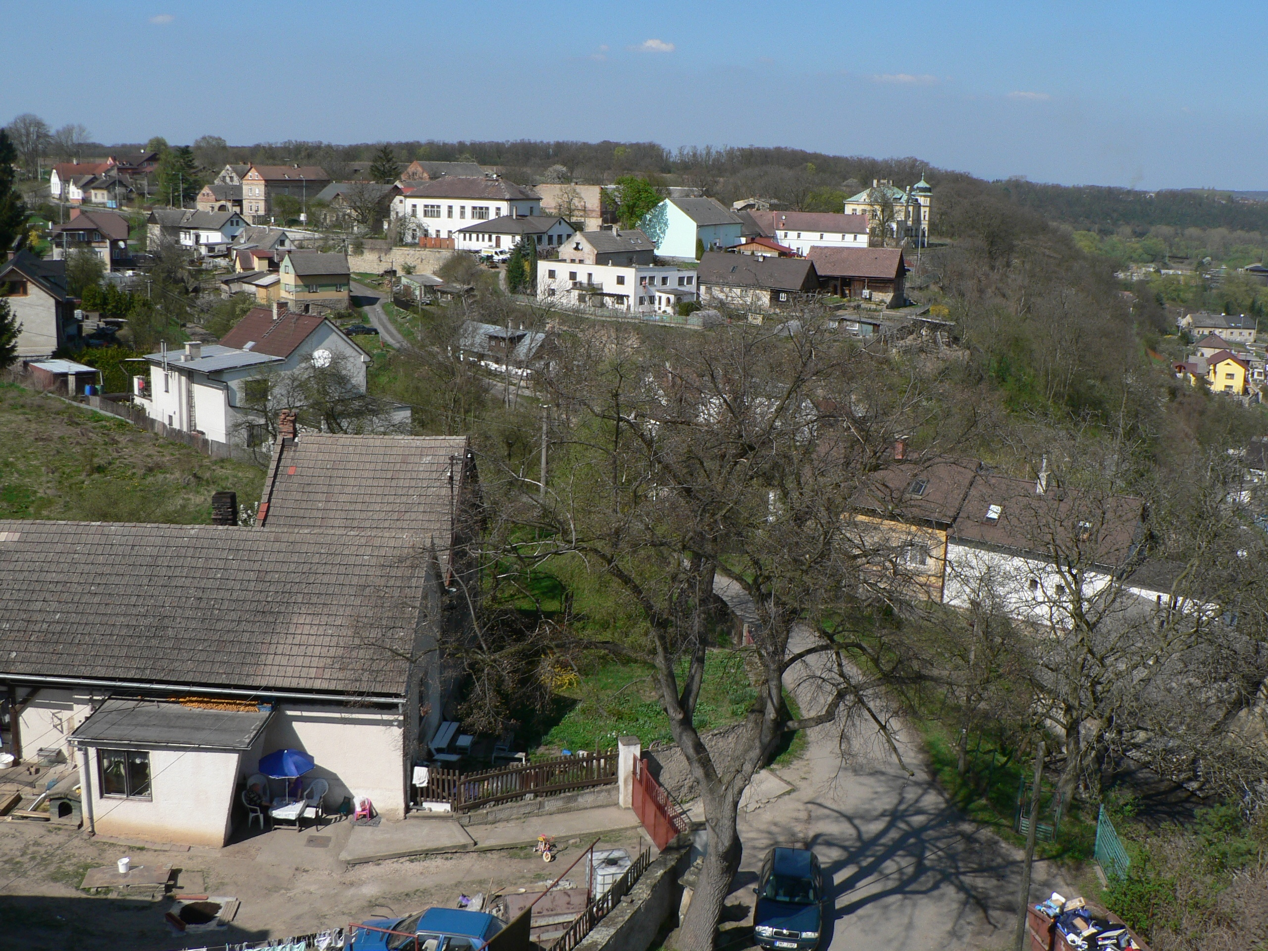 Pohled na Vinec z věže kostela